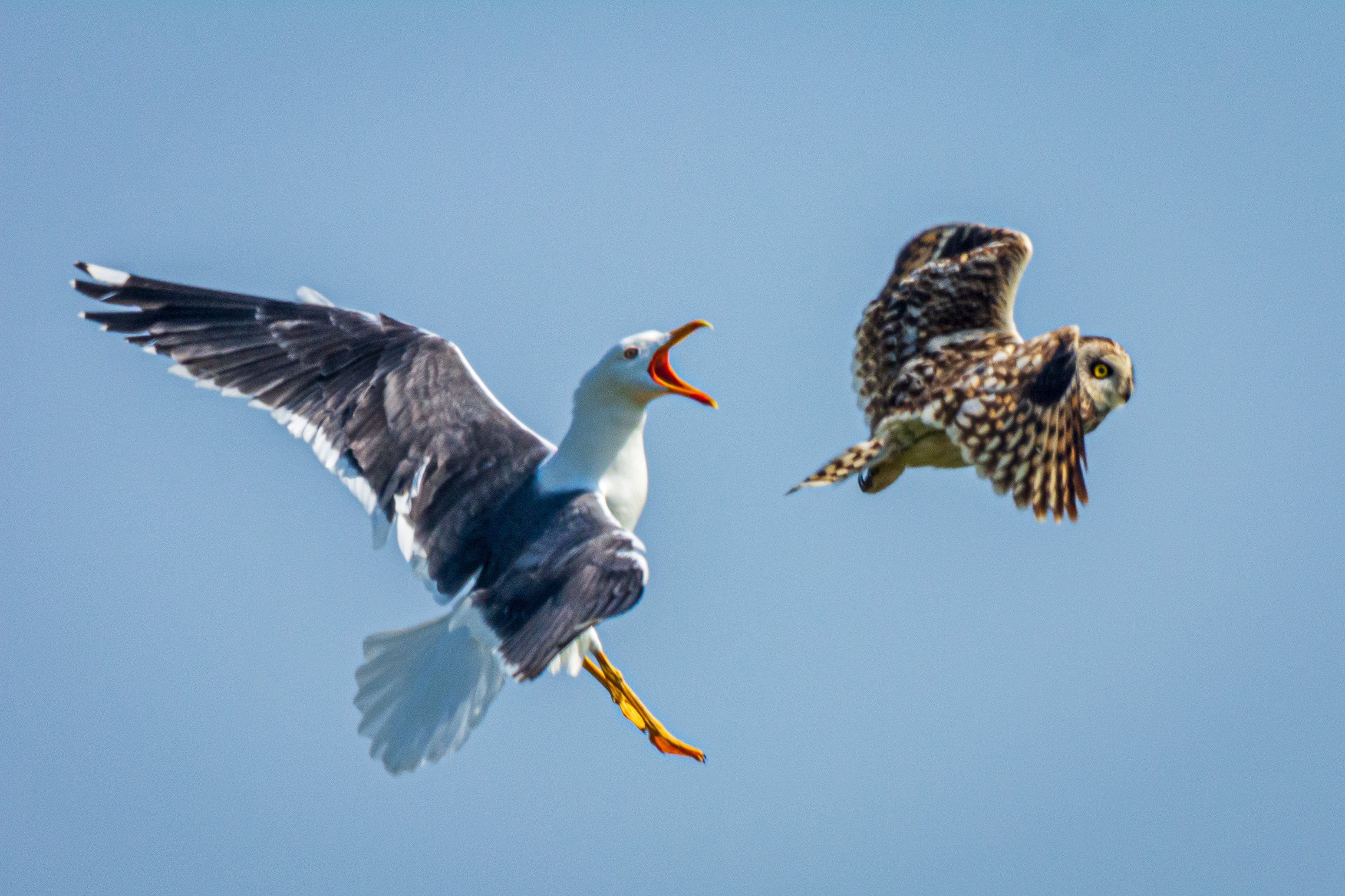 Heringsmöwe (larus fuscus) greift Sumpfohreule (asio flammeus) an (Spiekeroog - Nationalpark niedersächsisches Wattenmeer)